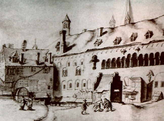 Köln, Erzbischöflicher Palest um1670